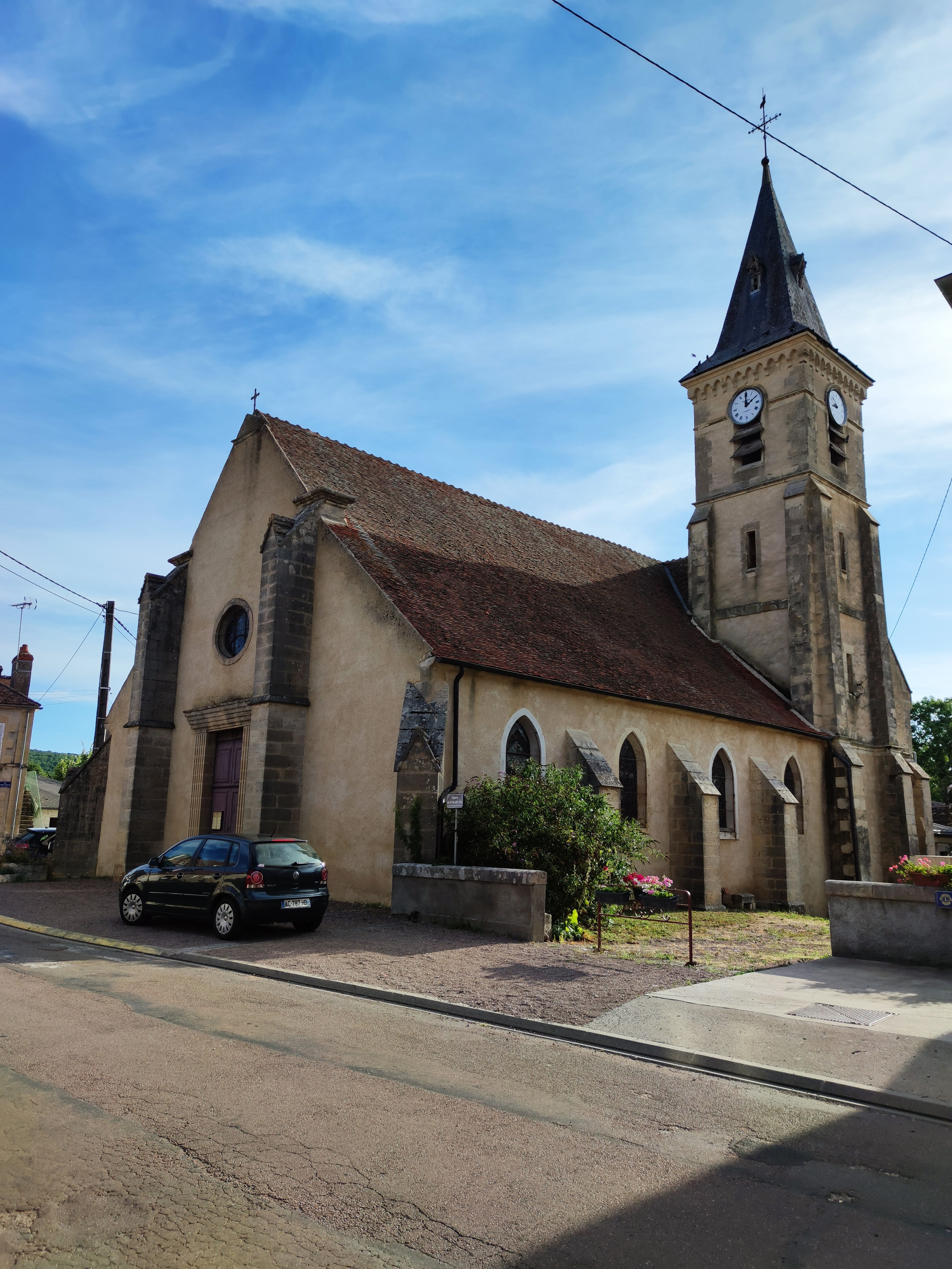 Eglise de Brinon-sur-Beuvron (58).